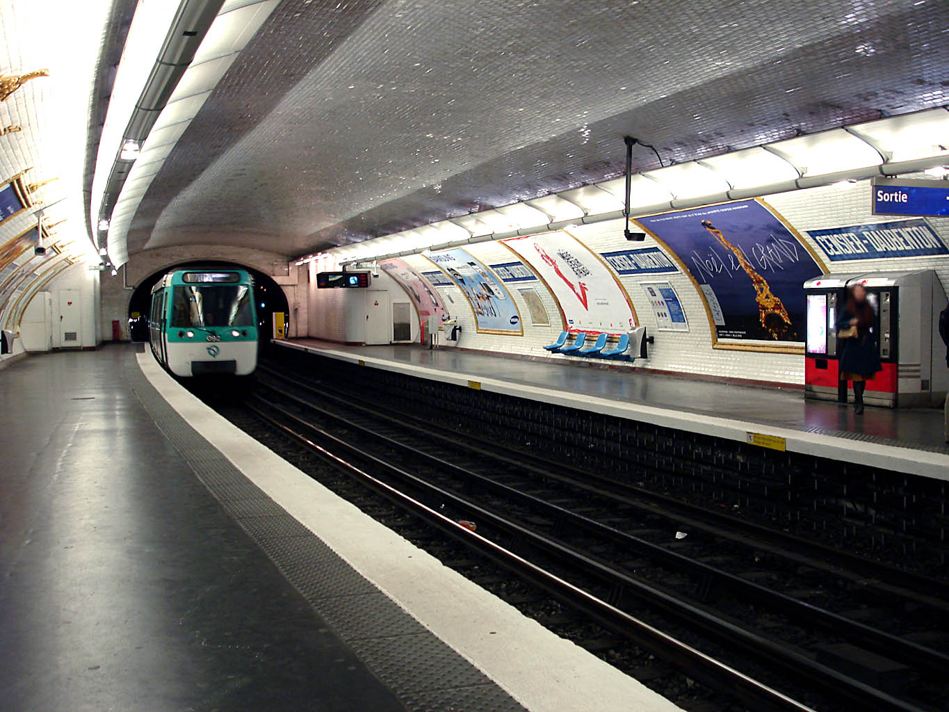 Station Censier - Daubenton de la ligne 7 du métro de Paris, France.